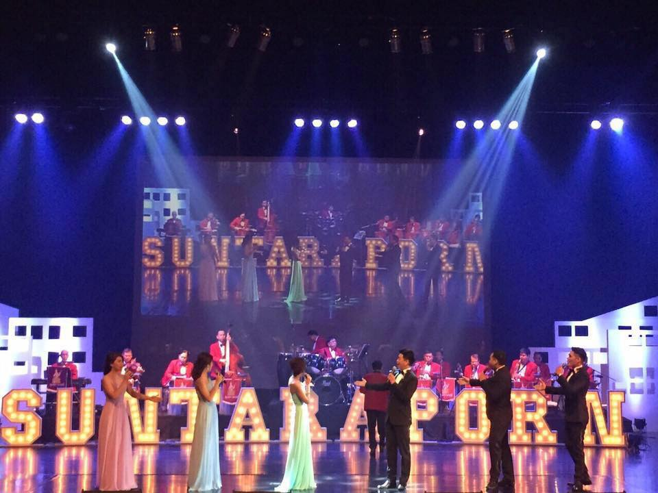 วงสุนทราภรณ์ปัจจุบัน